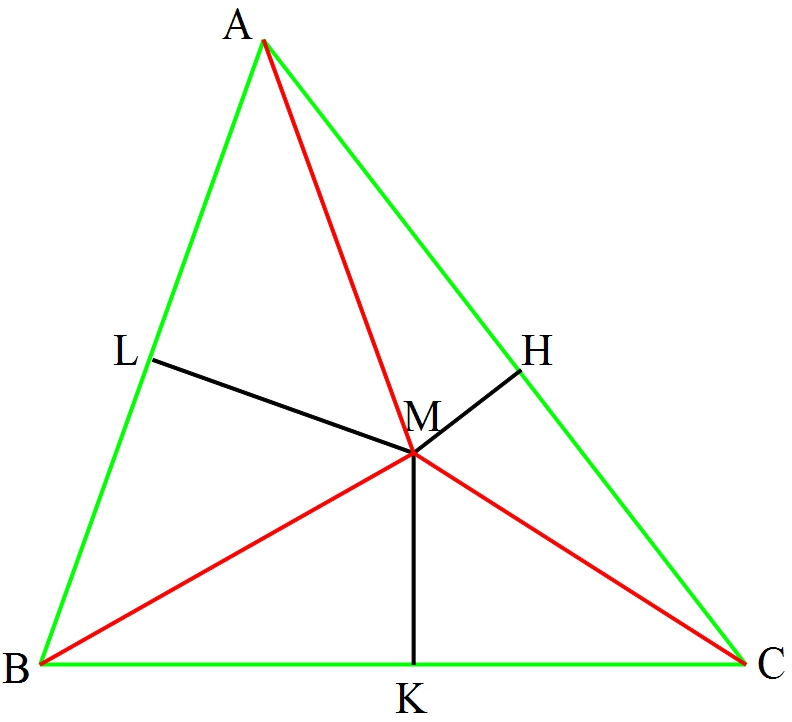 Figure illustrant le théorème d'Erdős-Mordell. Réalisée sous Open Office, capture d'écran retravaillée sous Gimp.